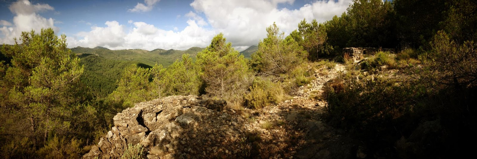 Vista parcial de les trinxeres de Vilamalur